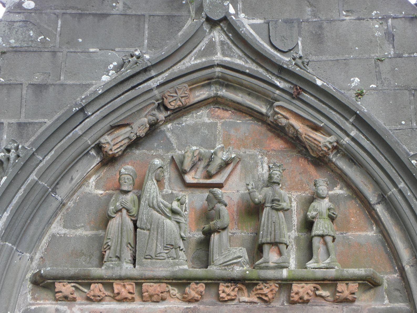 Adoration des Mages au tympan du porche sud de l'église Notre-Dame-de-Rumengol au Faou (29). .